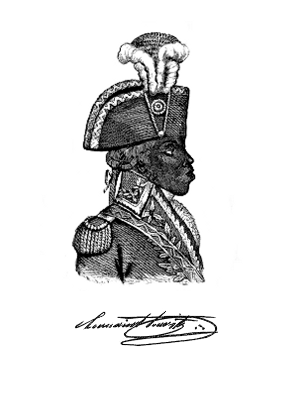 Portrait et signature de Toussaint Louverture in John Relly (J. R.) Beard, James Redpath.- Toussaint L'Ouverture : a biography and autobiography, Boston, 1863.